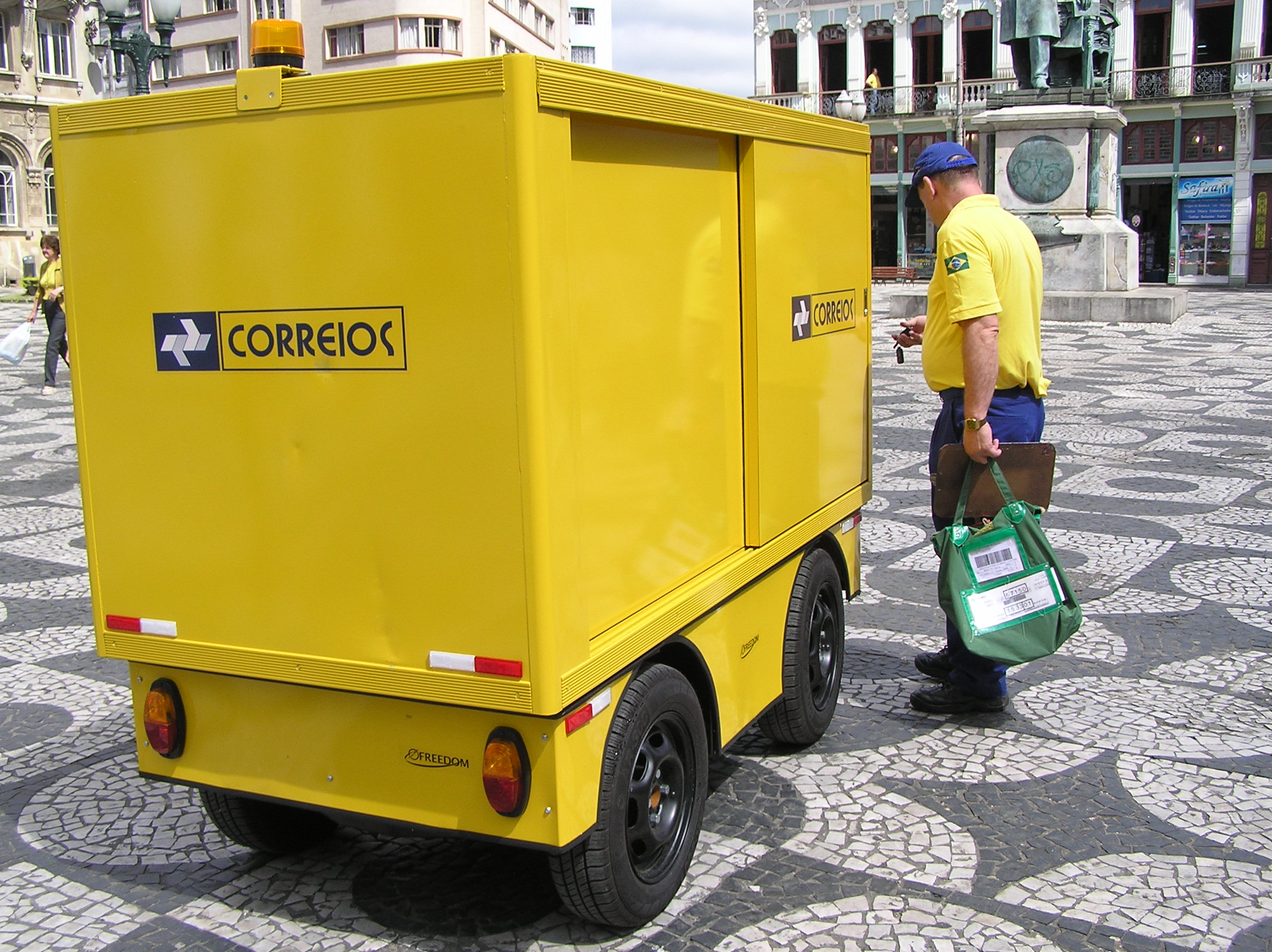 Correio (Postman).